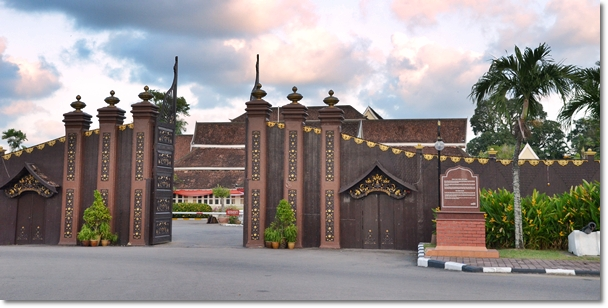 Istana Balai Besar